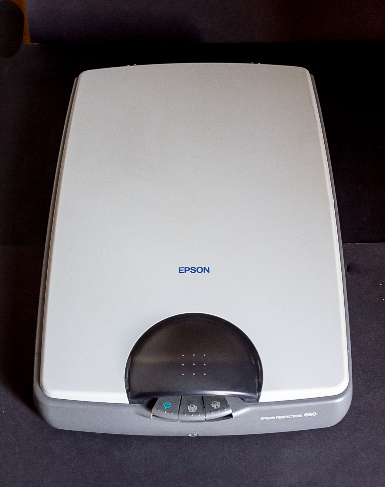 Epson Perfection 660 Scanner